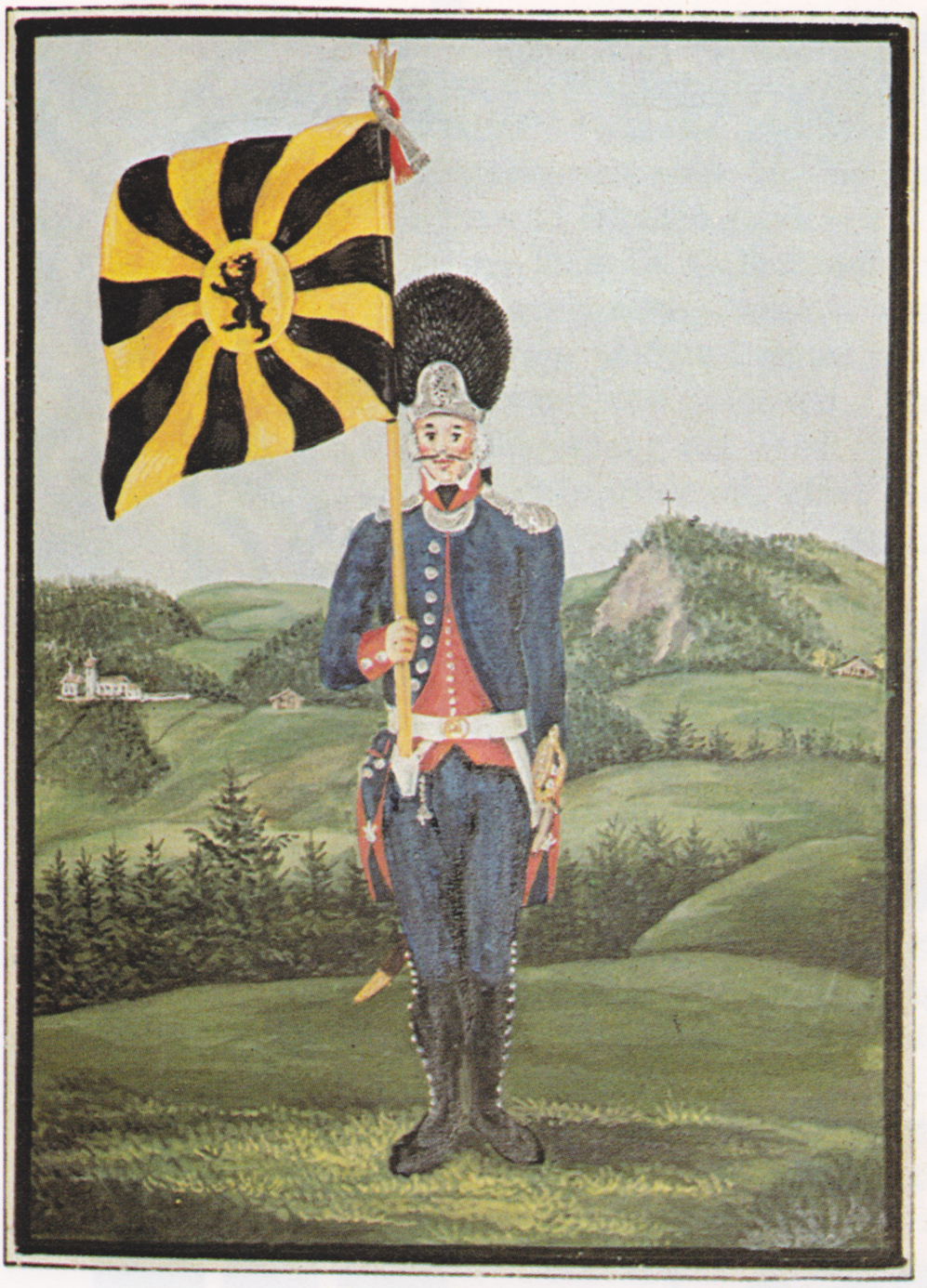 Fähnrich der Grenadierkompagnie der Fürstabtei St. Gallen.